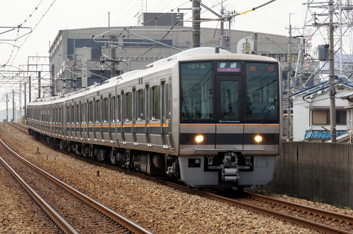 JR西日本207系（JR宝塚線）